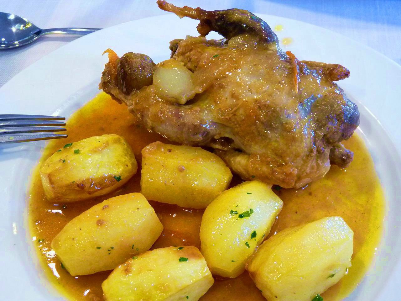 Un plato de perdiz, de Albacete, con patatas.